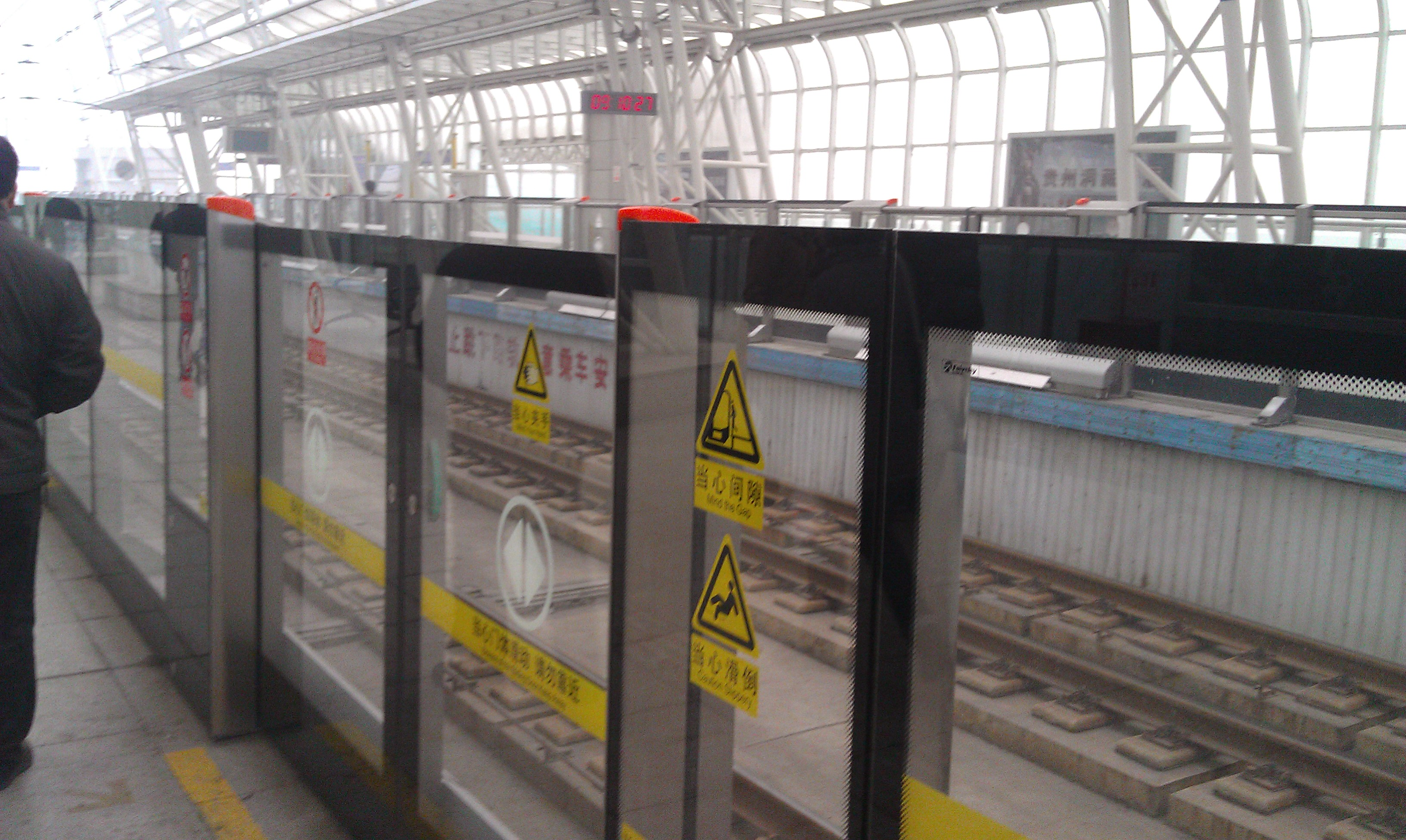 天津地铁九号线市民广场站已启用的安全门